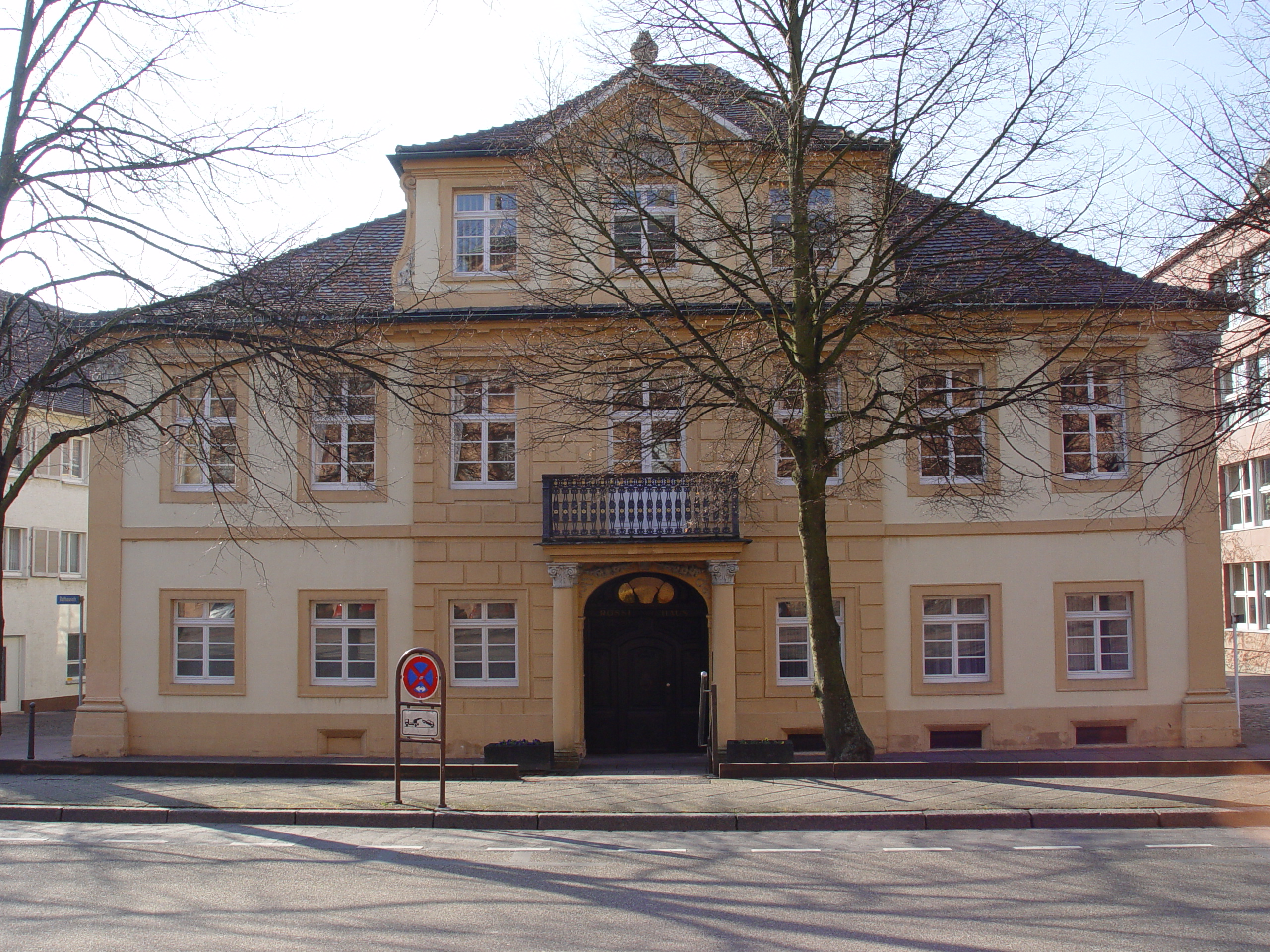 Fotografiert von Martin Dürrschnabel. Rossihaus in Rastatt.